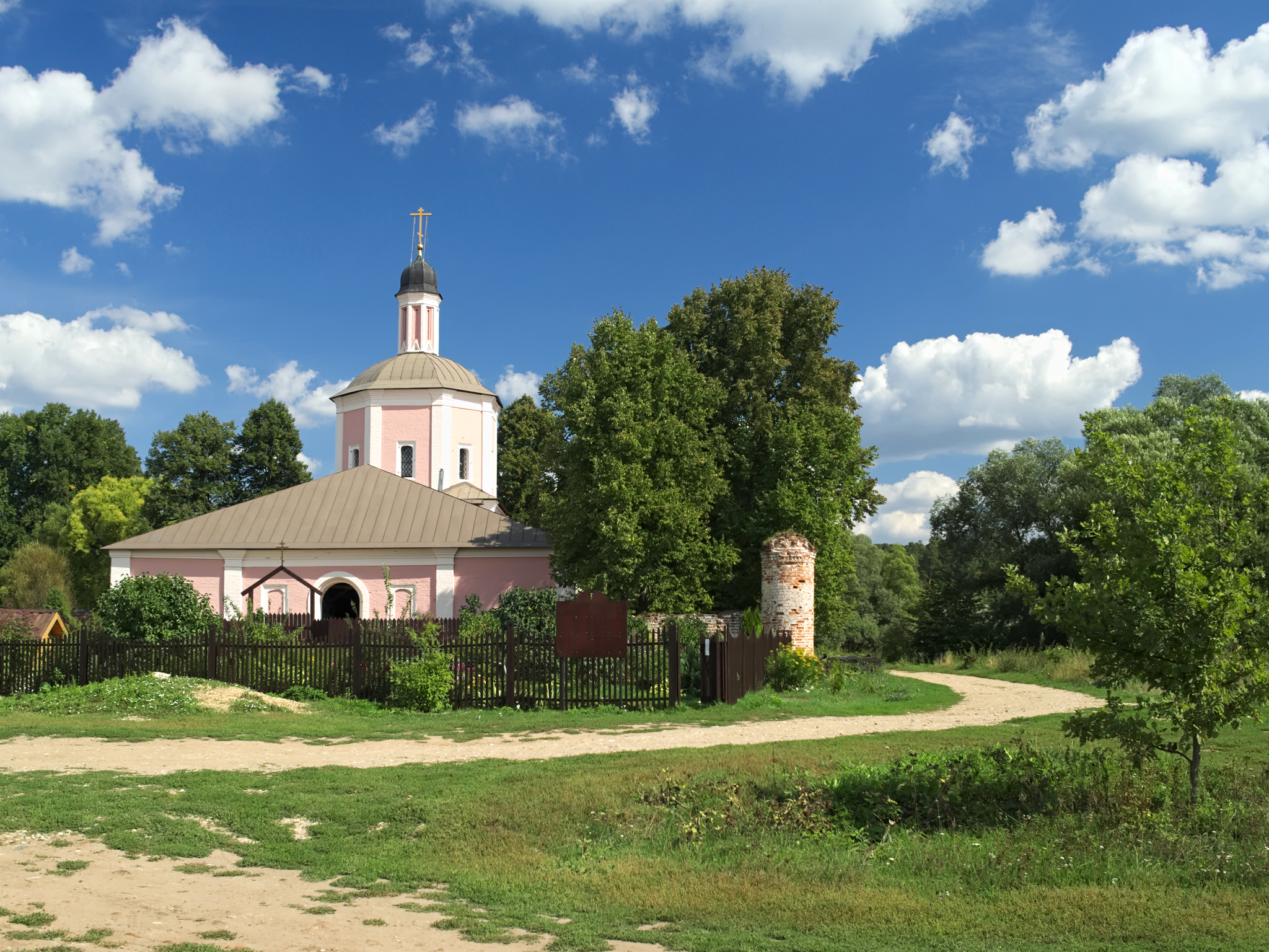 Церковь Воскресения Словущего - вид со стороны подвесного моста через Москву-реку